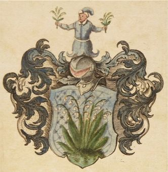 Familienwappen aus den genealogischen Registern der Stadt Schaffhausen, angelegt von Johann Ludwig Bartenschlager (1692–1773) ab 1744, 5. Band (M–N) Familie Meyer